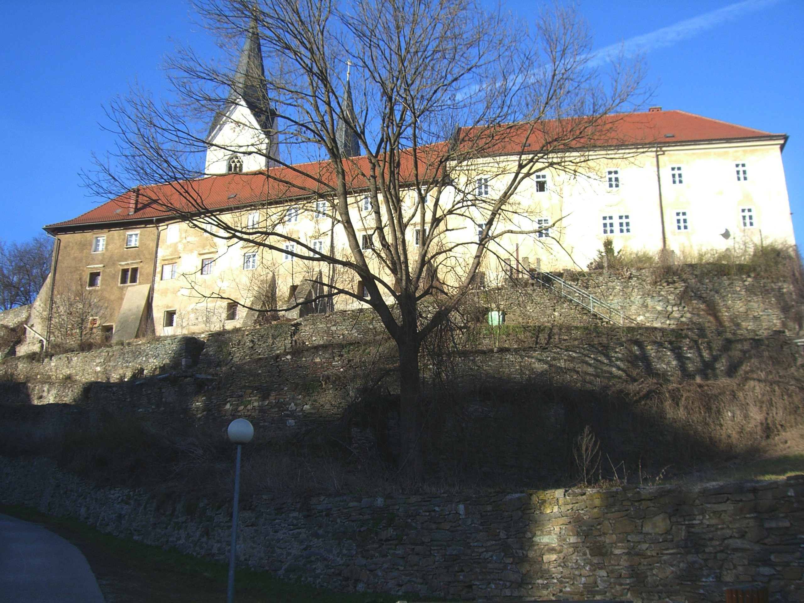 Stadtmauerreste entlang des Tränkweges in St. Andrä, Kärnten